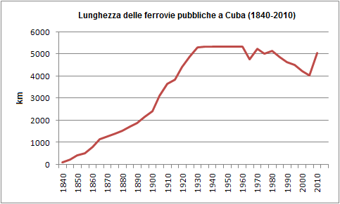 Lunghezza delle ferrovie pubbliche a Cuba (1840-2010).